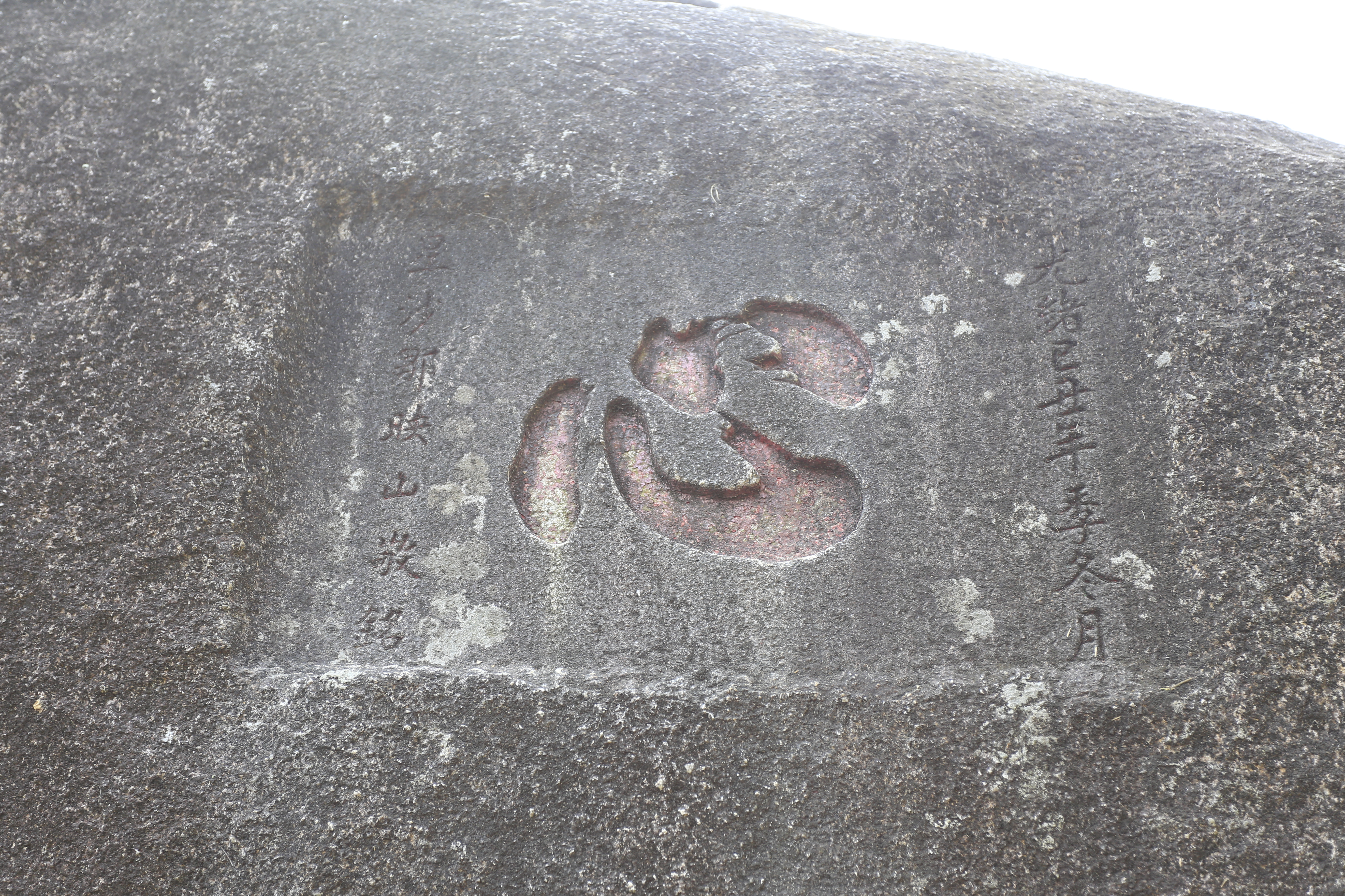 潮州葫芦山摩崖石刻